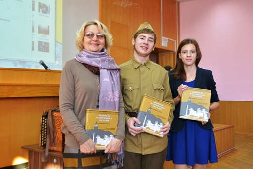 Делегация музея Политехнической гимназии на презентации книги "Хранители исторического наследия": Ерёмкина Антонина Павловна, Коновалов Дмитрий Денисович, Ермолаева Александра